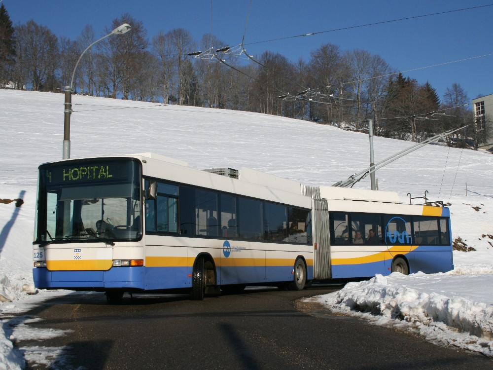 Der NAW/Hess/Siemens BGT-N2 "Swisstrolley 2" Nr. 125 in La Chaux-de-Fonds an der Haltestelle Eplatures